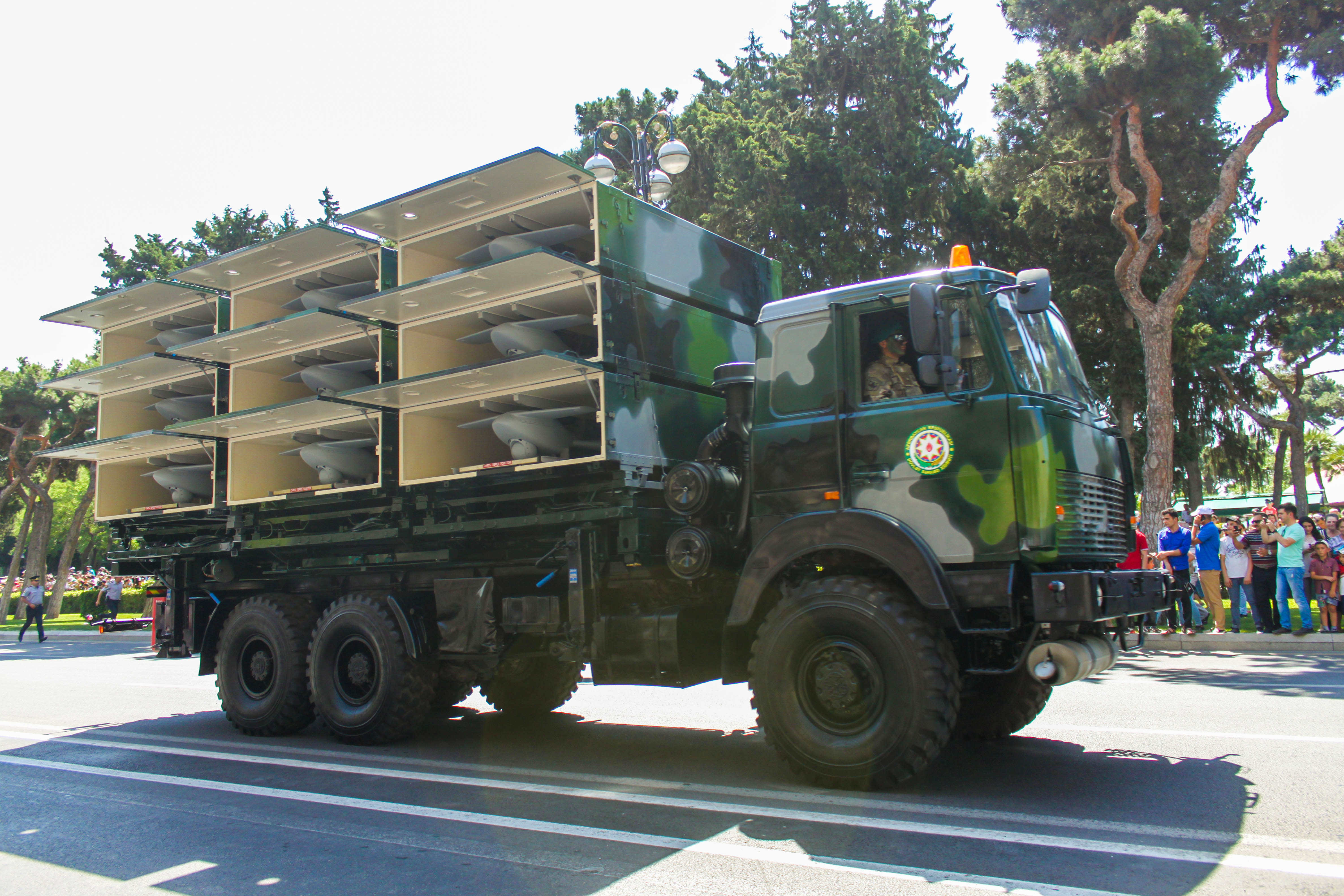 Military parade 2018